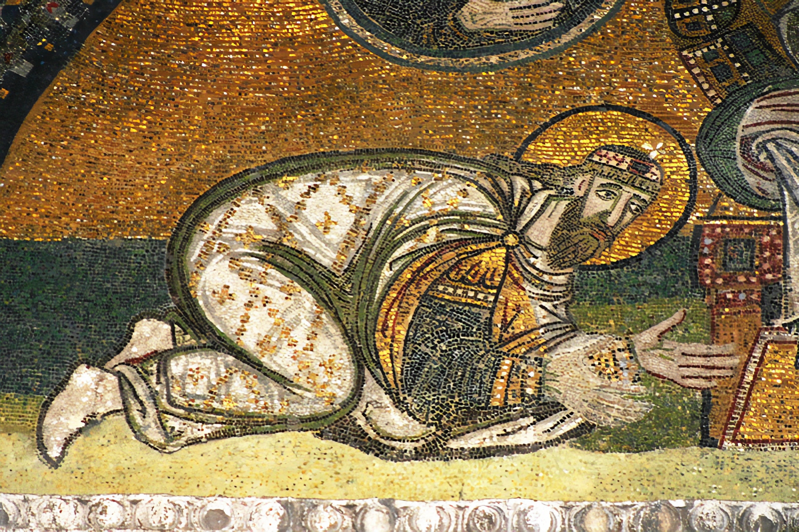 Detalhe do mosaico do Portão Imperial em Hagia Sophia. Ajoelhado está o imperador bizantino Leão VI.